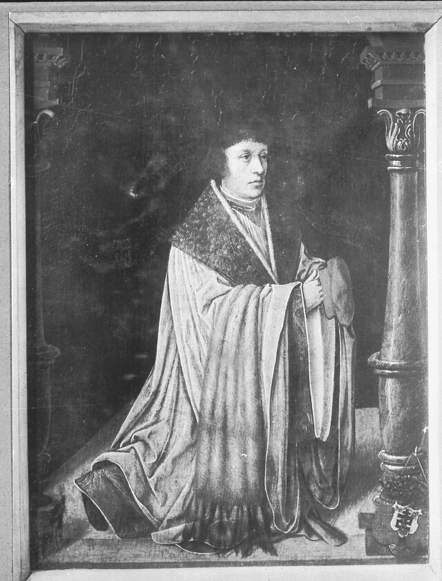 Stifterbild des Kanonikers Adolf Eichholz aus St. Mariengraden, um 1530, Wallraf-Richartz-Museum Köln (Inv.-Nr. WRM 0264). Über dem Arm trägt der Kanoniker eine Almutia aus Fehrückenfell.